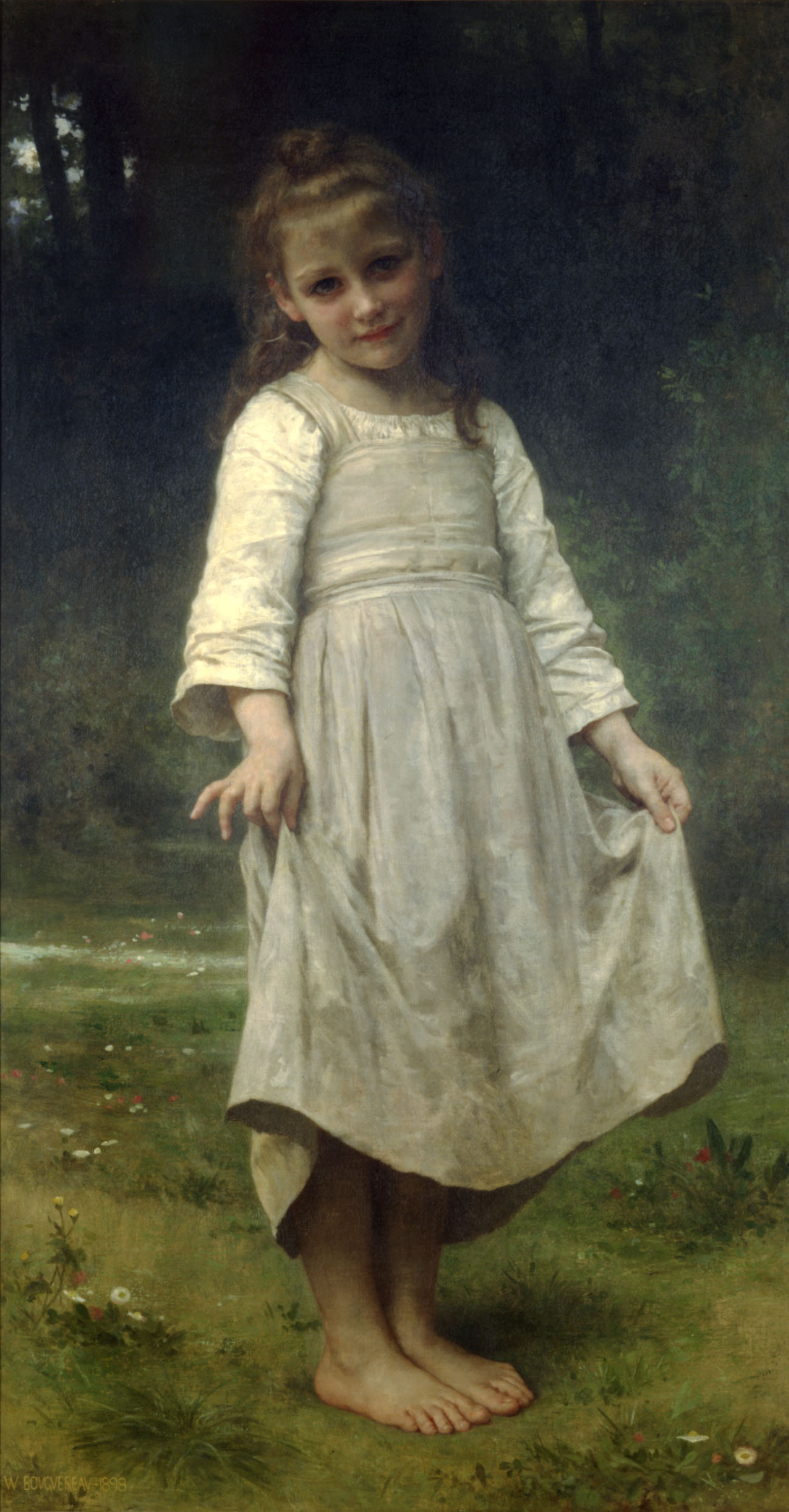 La révérence (french for "the curtsey")